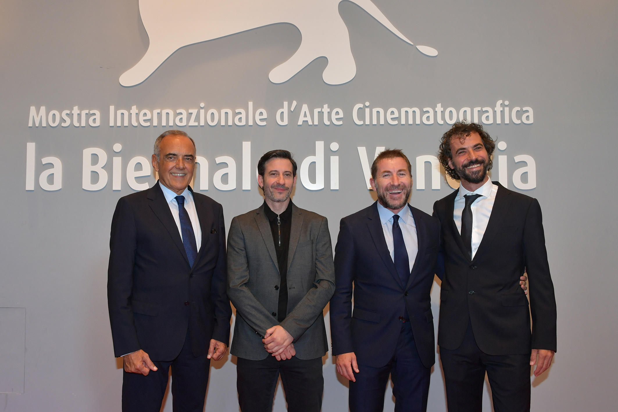 La Noche de 12 Años (A Twelve-Year Night) - presentation at 75º Venice Film Festival (Alberto Barbera, Alfonso Tort, Antonio de la Torre, Álvaro Brechner)